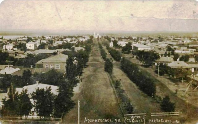 Город Константиновск улица Архангельская